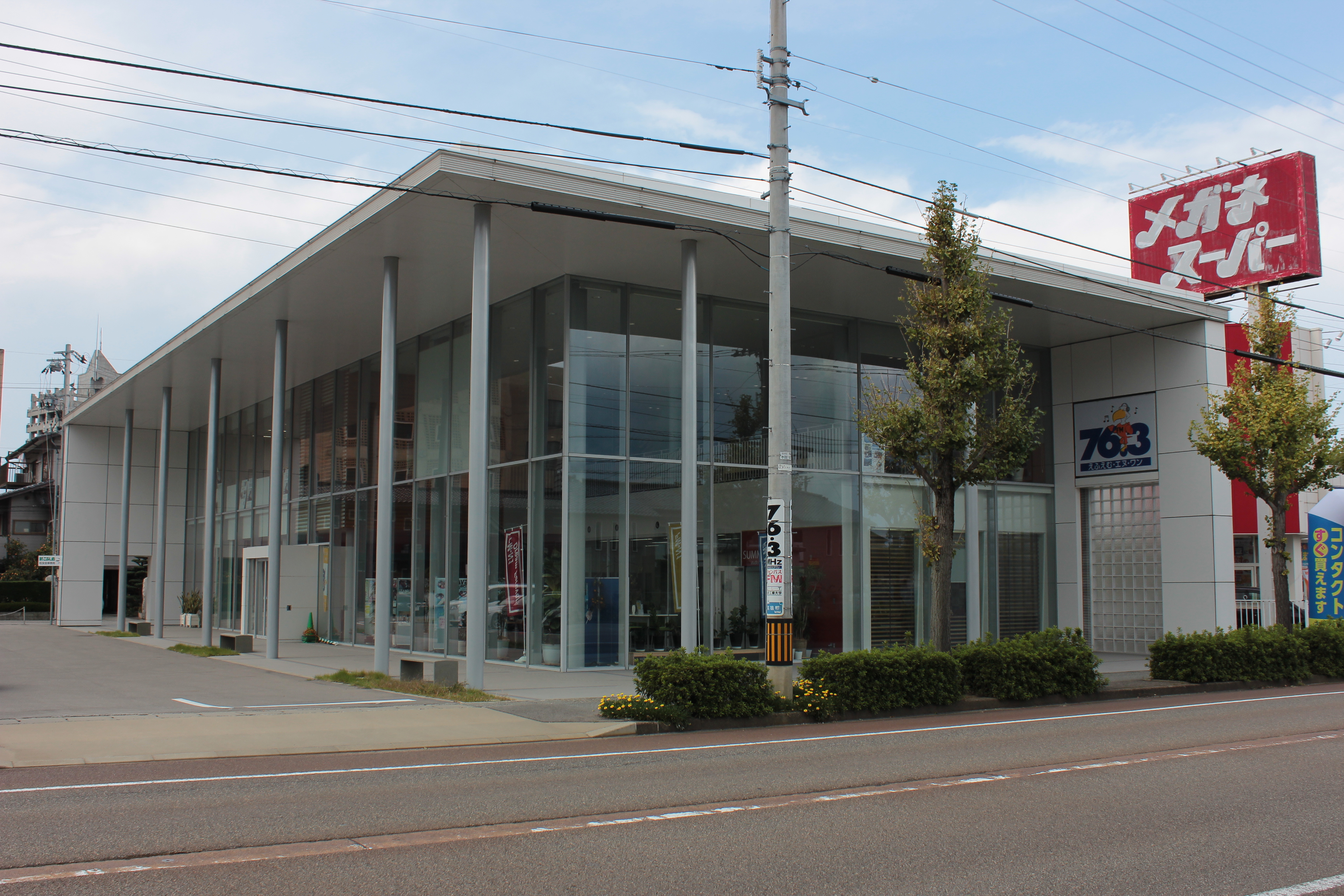 えふえむ・エヌ・ワン新本社（石川県野々市市） Canon EOS Kiss X5